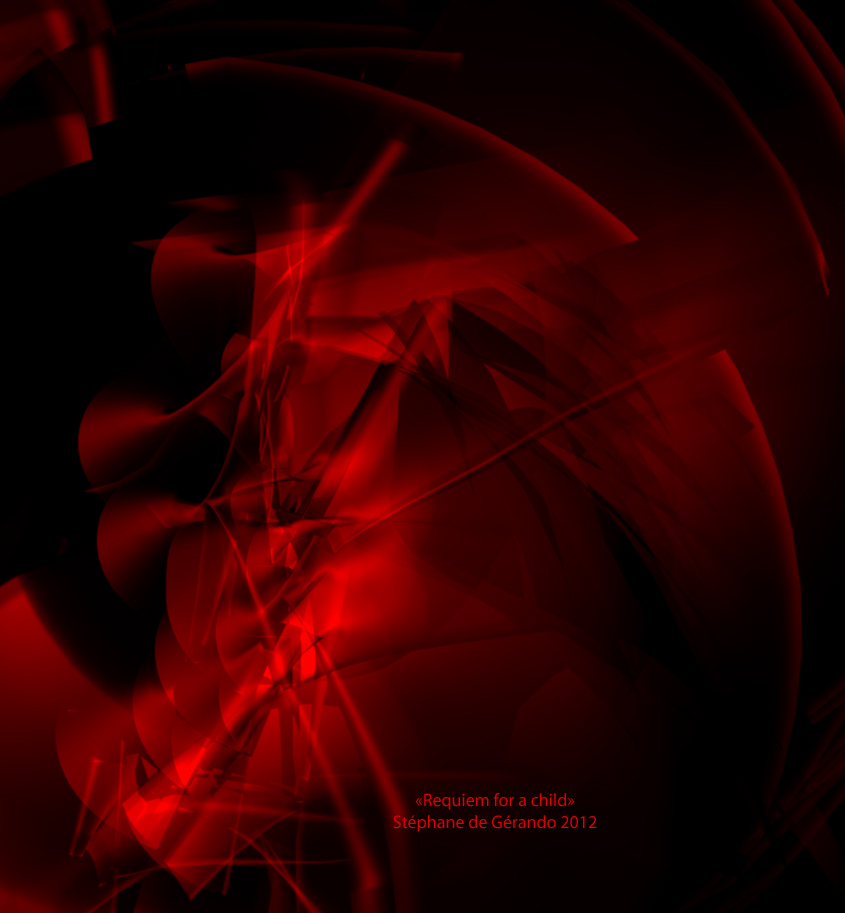 Stéphane de Gérando : Requiem for a child